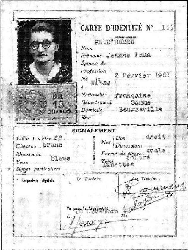 Valse identiteiskaart die werd gebruikt door Françoise Gaillard tijdens haar activiteiten binnen het Franse verzet.